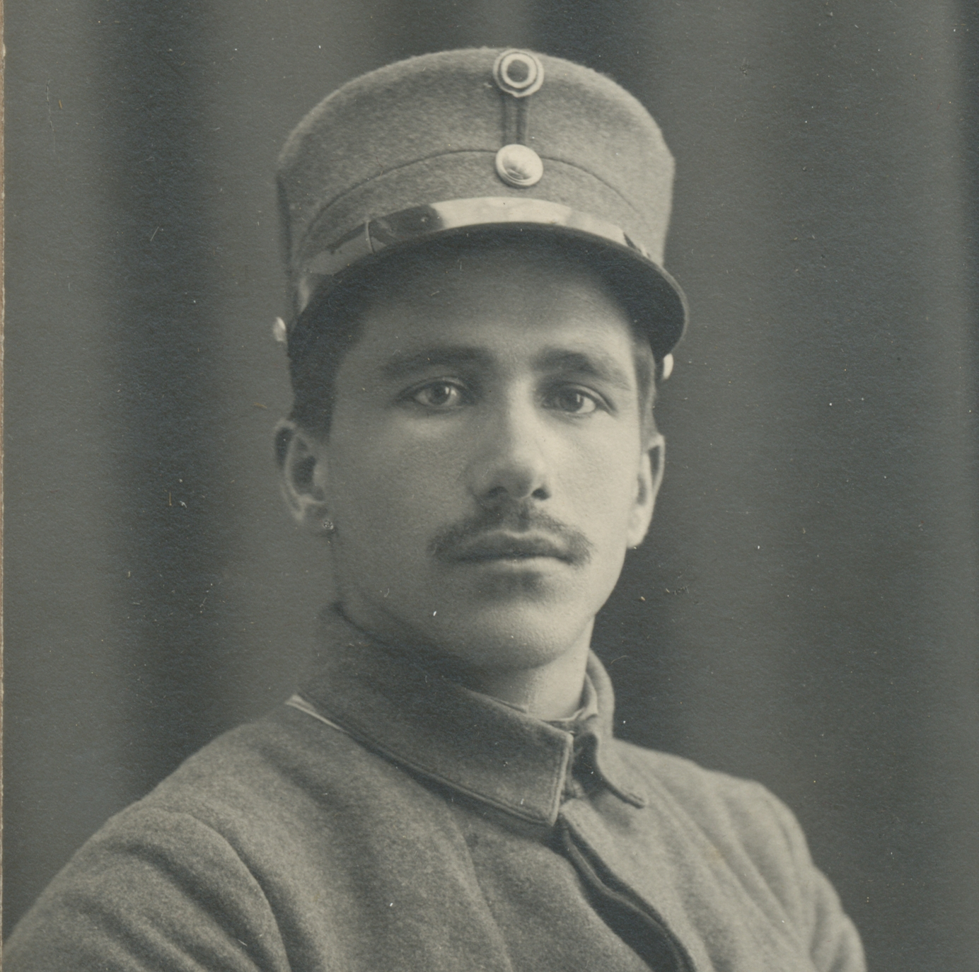 Kristian Emil Herje (f. 1894 på Grip), lærer i Åsen 1915-16. Utdannet fra Volda lærerskole i 1915. Kom til Åsen som nyutdannet, og virket i Leangen krets. Emil Herje reiste fra Åsen i 1916, og var senere bl.a. på Fillan (Hitra), Romedal (Hedmark) og Strinda. Se Norske skulefolk (1934). Fotograf / Photographer: K. Næss, Stjørdalen Fotoeier / Photo owner: Johannes Naavik Digitalisering / Digitizing: Arne Langås (2009) Foto-ID / Photo ID: 043-0173 Hvis bildet gjengis i andre sammenhenger, oppgi Åsen Museum og Historielag, fotoeier og fotograf som kildereferanse. Har du utfyllende opplysninger? Legg gjerne igjen en kommentar nedenfor eller send e-post til . | If you re-use this photo, please refer to Åsen Museum og Historielag, the photographer and the owner of the photo. Do you have additional information? Please leave a comment or send an e-mail to .